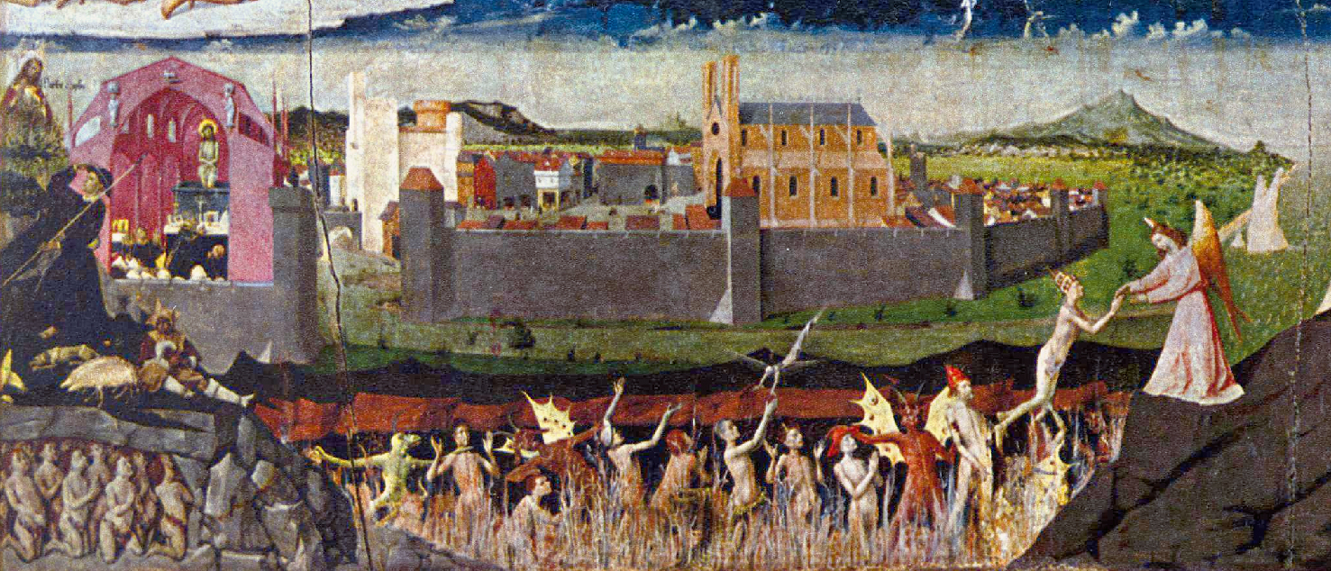 Detalhe da Coroação da Virgem